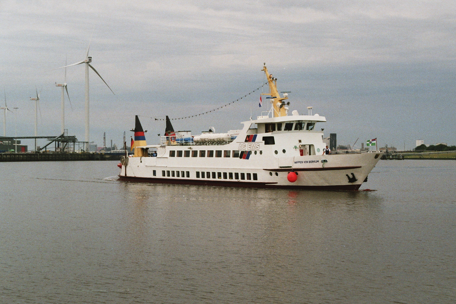 De Wappen von Borkum van AG Ems legt aan in Delfzijl om daarna naar Knock en Borkum te gaan voor de dienst op vrijdag 8 augustus 2015